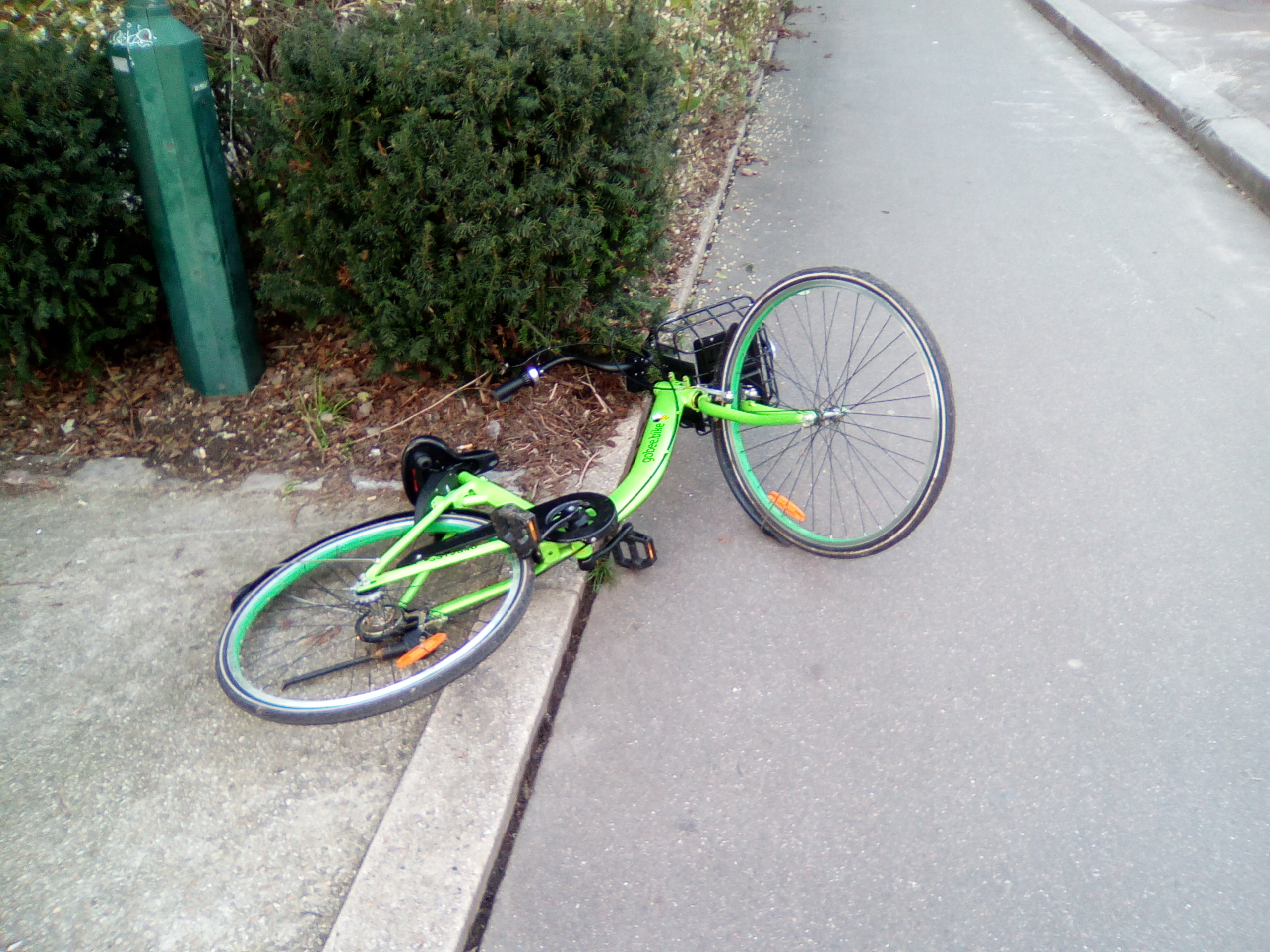 Un Gobee bike abandonné en plein milieu de la coulée verte (Paris 12e).